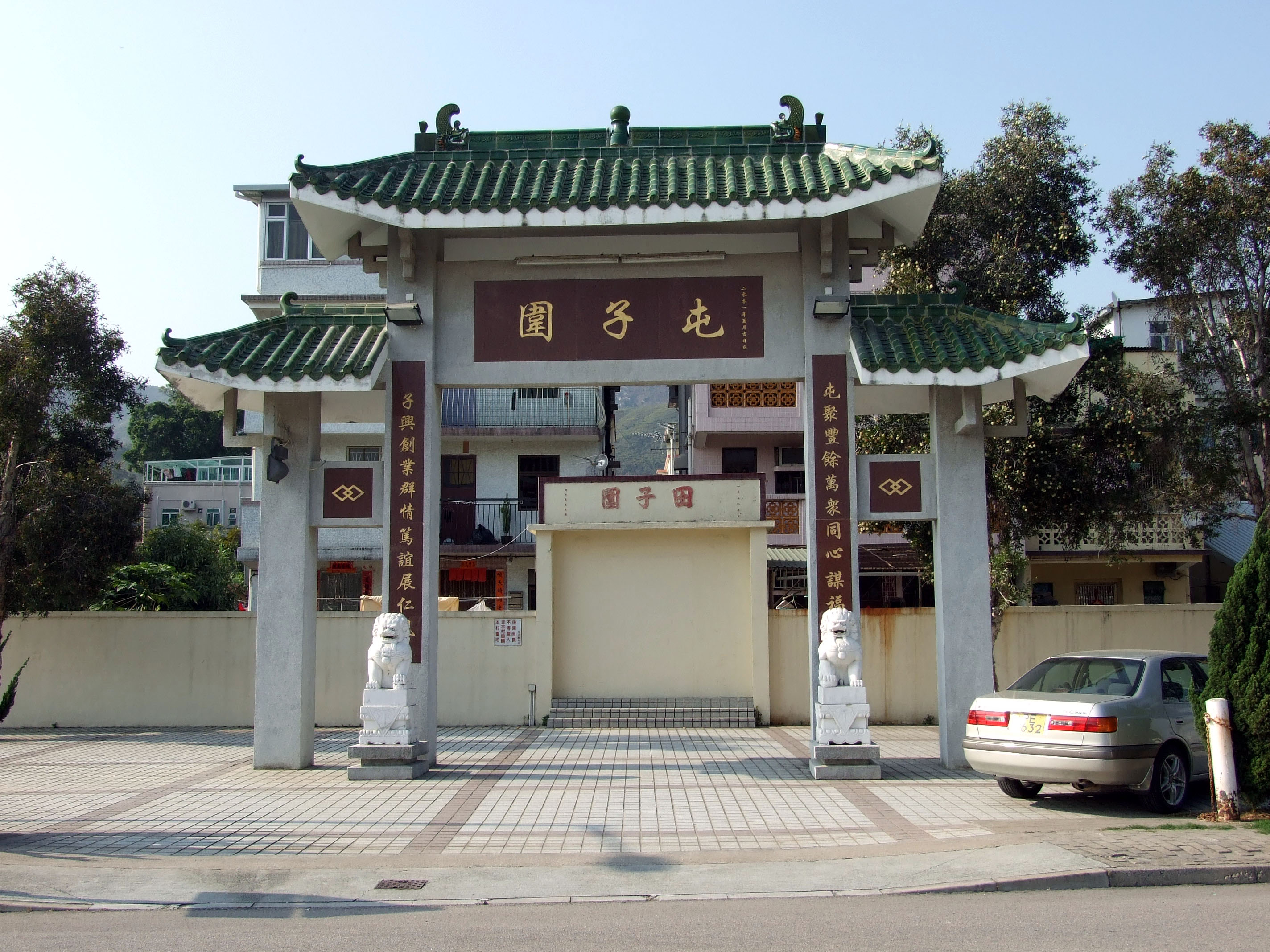 中文（香港）: 屯子圍